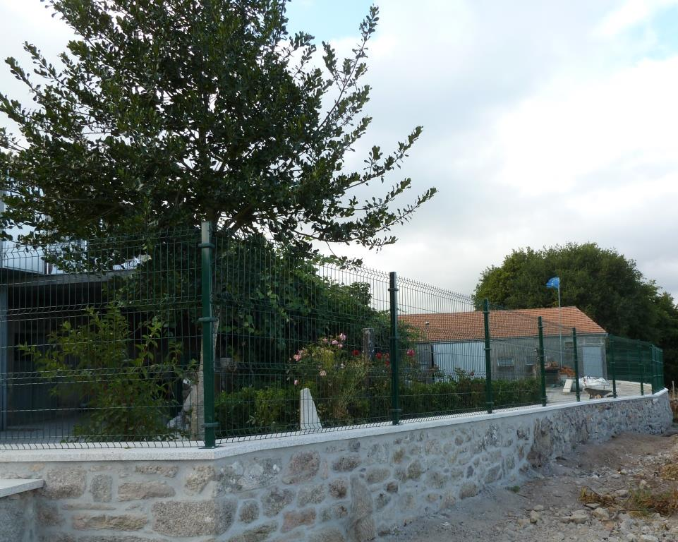 Lobelle de Arriba, parroquia de Lobelle, Concello de Carballedo, Lugo